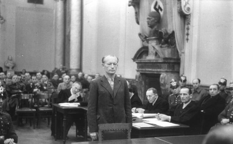 Volksgerichtshof, Adolf Reichwein Berlin.- Volksgerichtshof, Prozeß nach dem 20. Juli 1944, Adolf Reichwein Abgebildete Personen: Reichwein, Adolf: Kulturpolitiker, SPD, Prozeß 20. Juli 1944, hingerichtet 1944, Deutschland (GND 118599208)